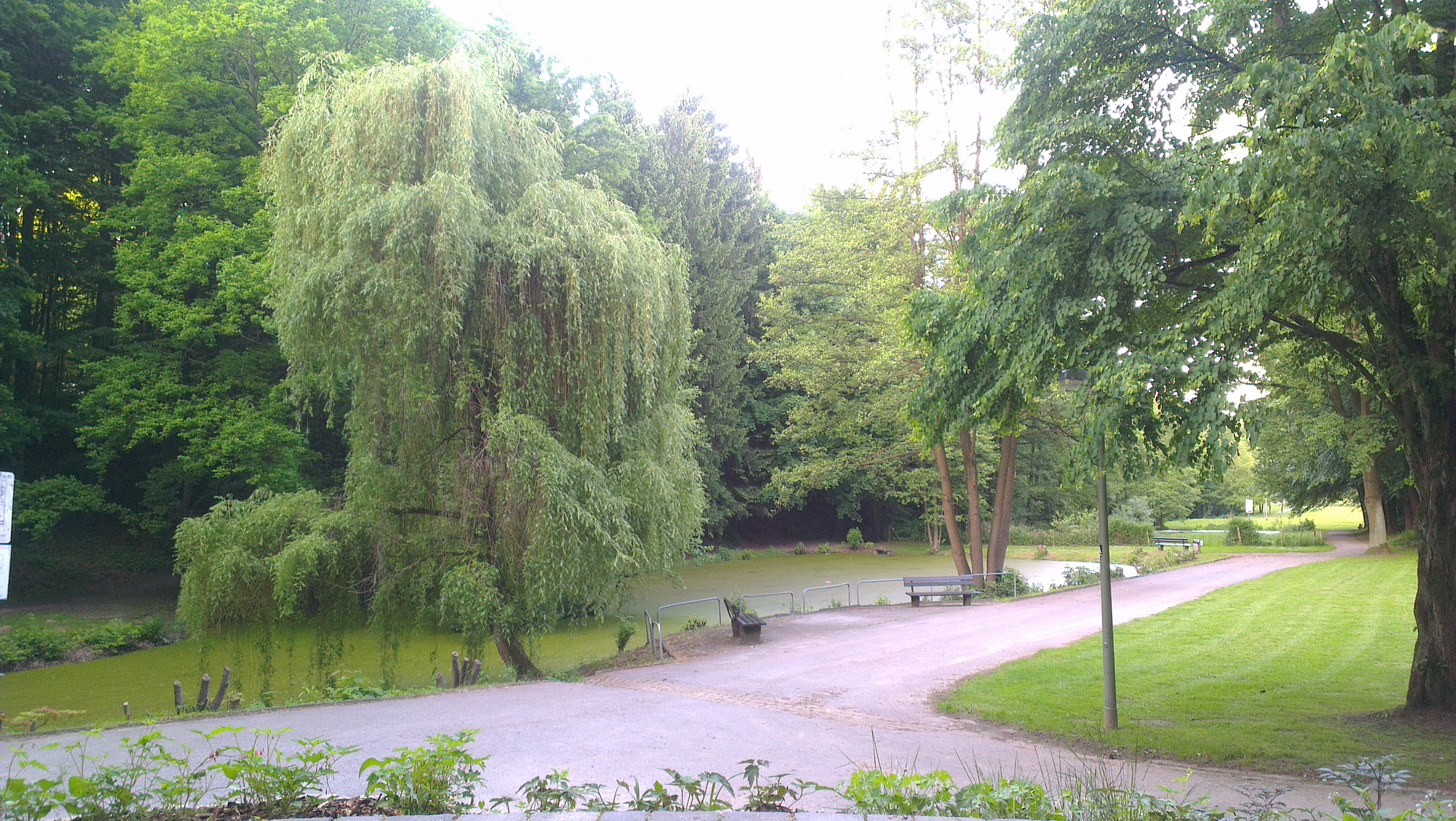 Der letzte und größte der sieben Teiche